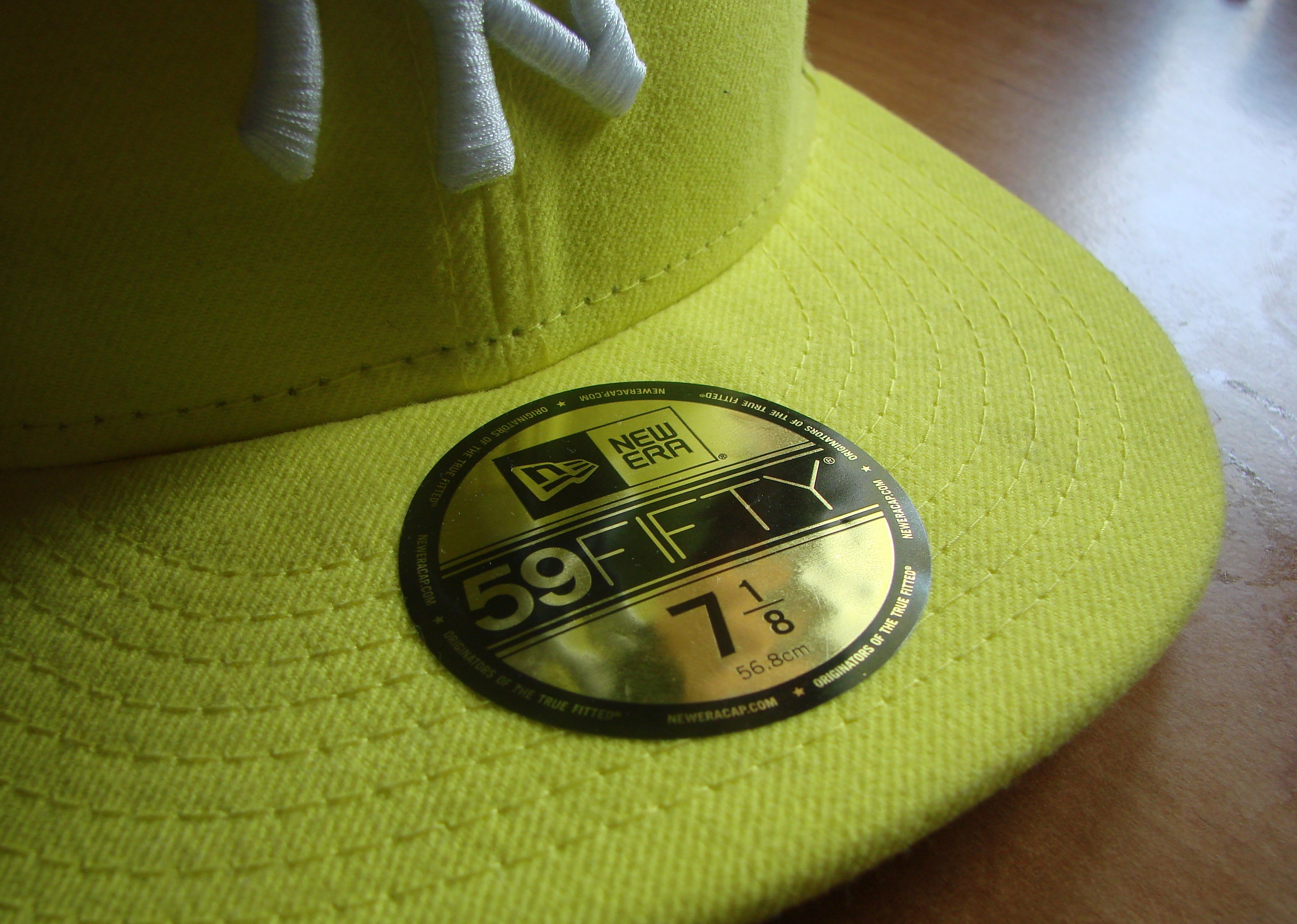 Visor Sticker on the brim of a New Era cap.